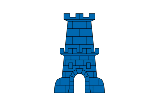 Vlag van de gemeente Gingelom